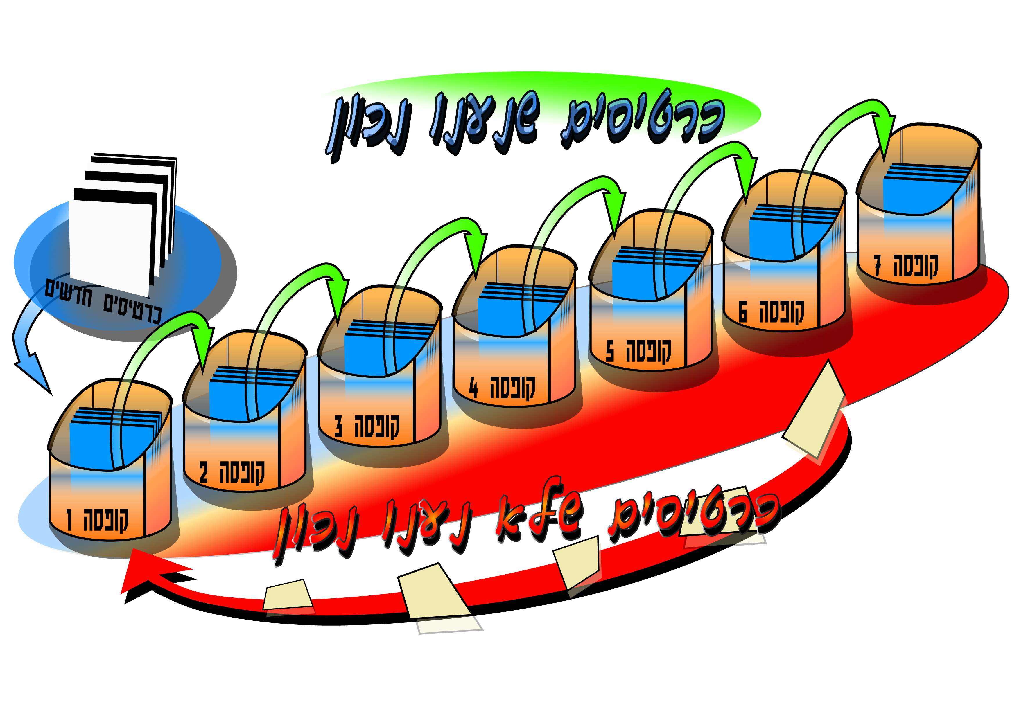 במערכת לייטנר, כרטיסים שנענו נכון מתקדמים הלאה, לקופסה פחות תדירה, בשעה שכרטיסים שלא נענו נכון חוזרים לקופסה הראשונה לעיון יותר עז ושינון יותר מעמיק. תיאור עבודה באמצעות שוטף תמידי, שיטה המבוססת על מערכת לייטנר. In the Leitner system, tickets that have been answered correctly move on, to a less frequent box, while missed cards correctly return to the first box for more intense review and more in-depth memorization. Description of work by Fluent Forever, a method based on Leitner system method.